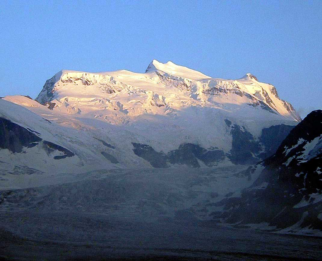 Grand Combin von der Cabane de Panossiere